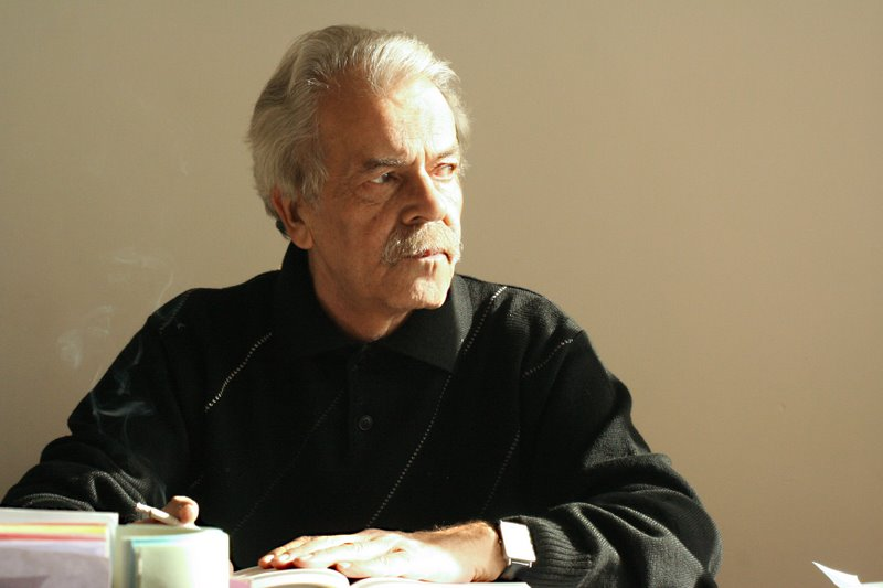 مترجم Translator